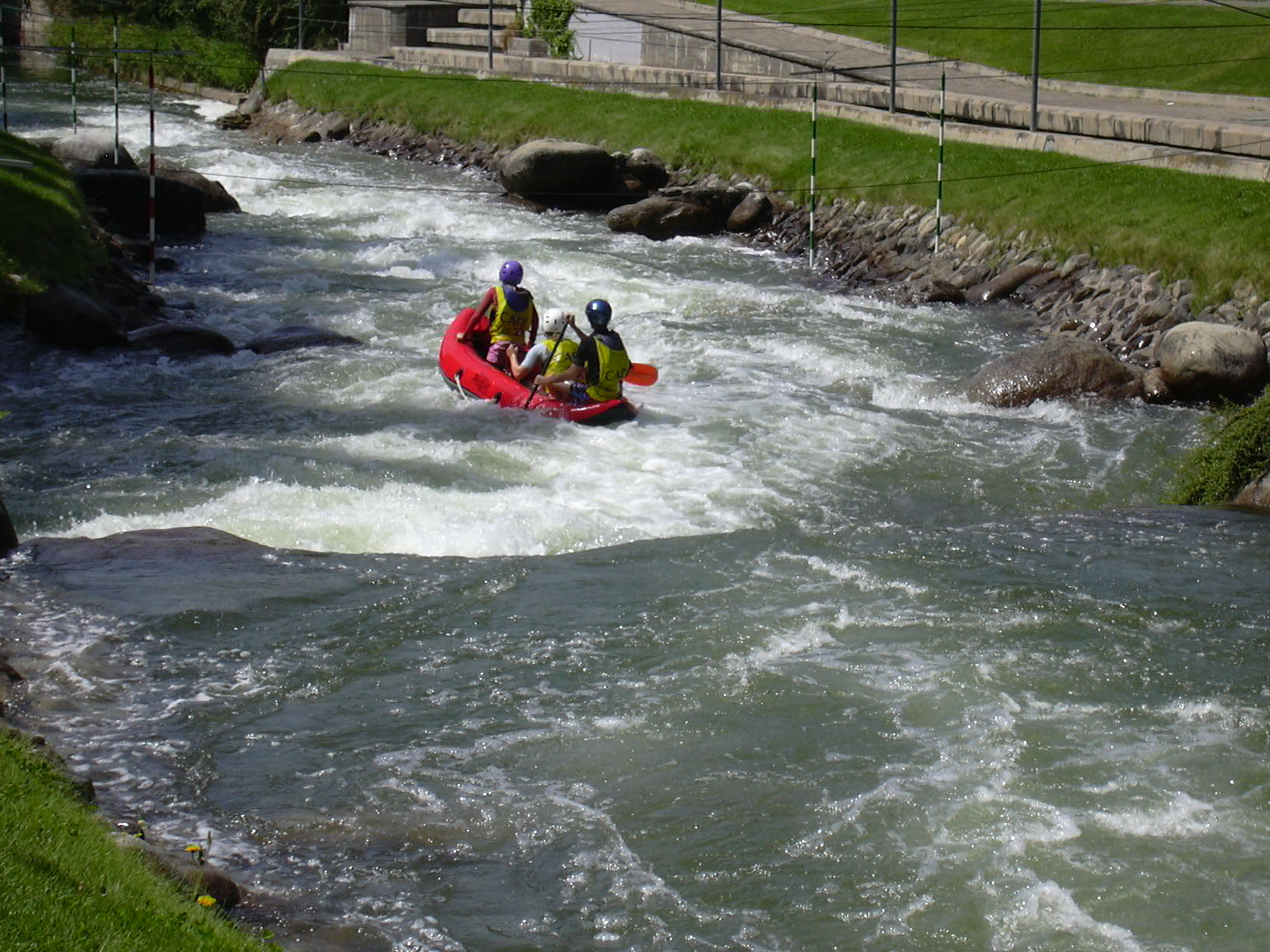 Parque Olímpico del Segre